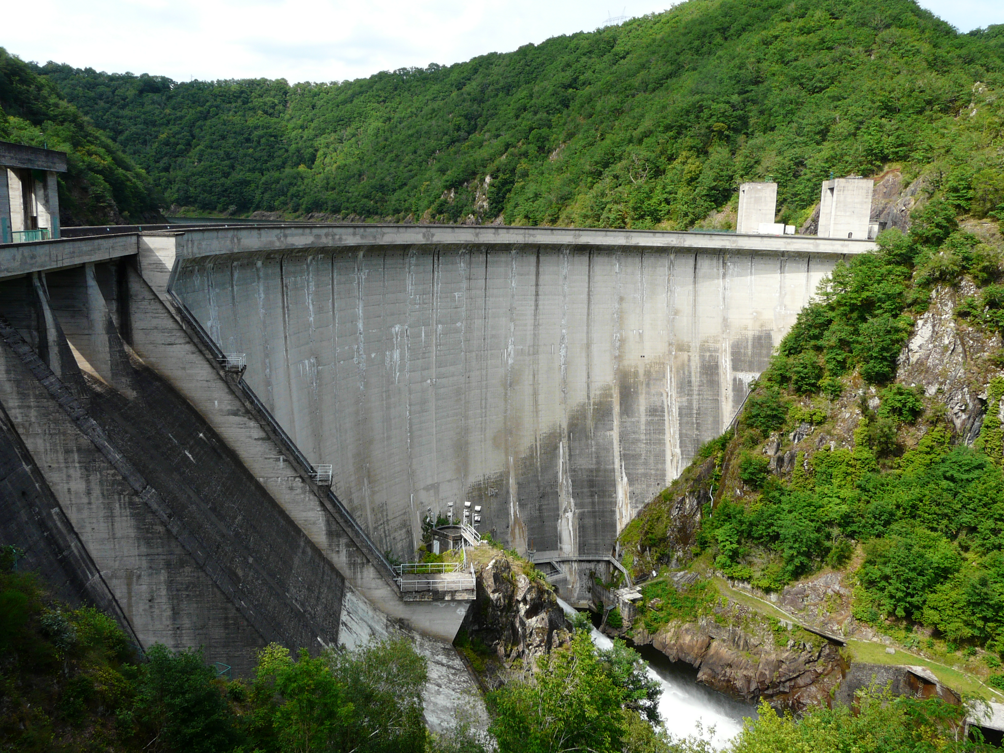 Le barrage de Marèges entre Liginiac (Corrèze) à gauche et Saint-Pierre (Cantal) à droite.